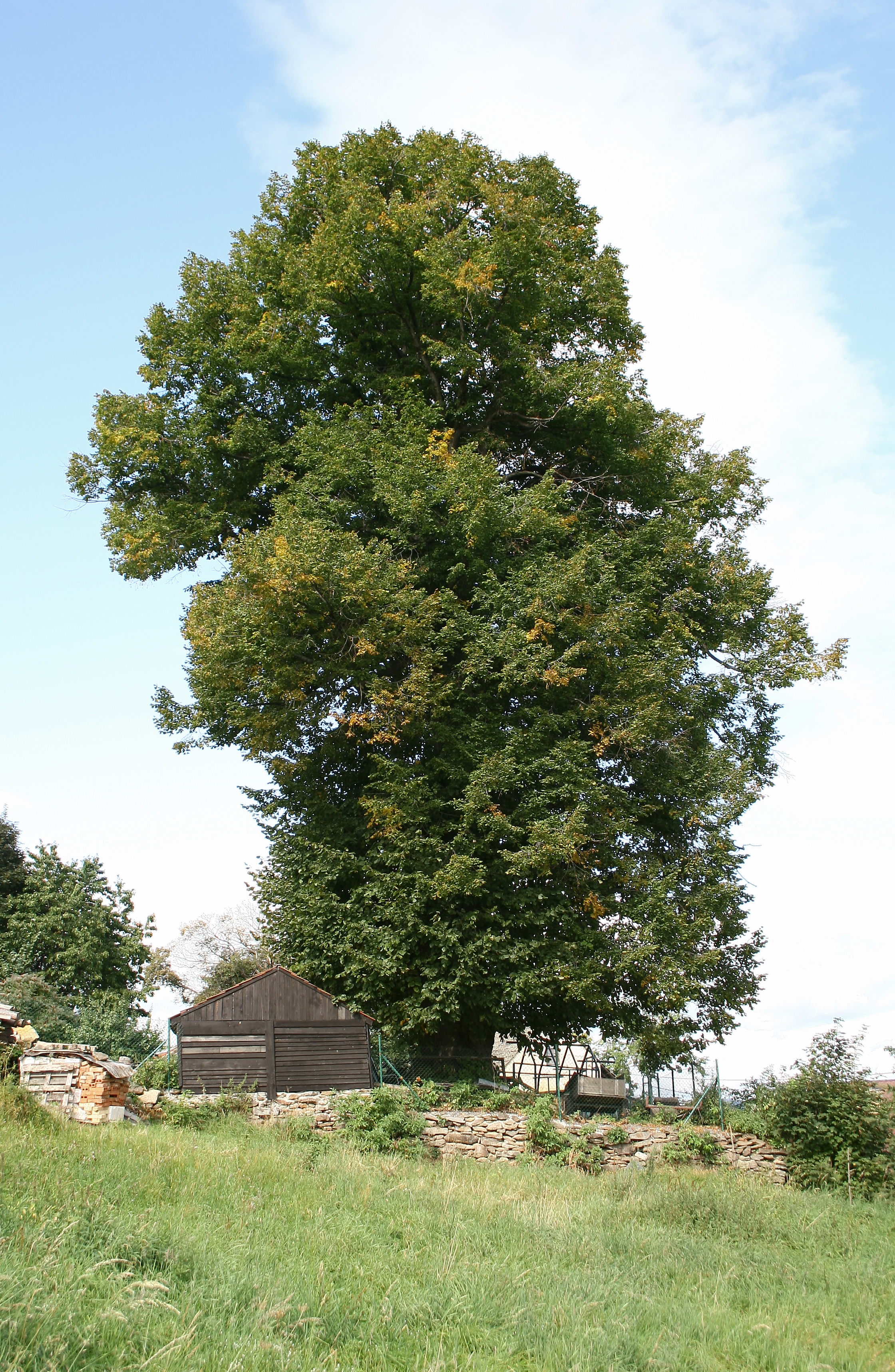 Památná lípa (Tilia platyphyllos) v Albrechticích. Okres Klatovy, Plzeňský kraj, Česká republika.